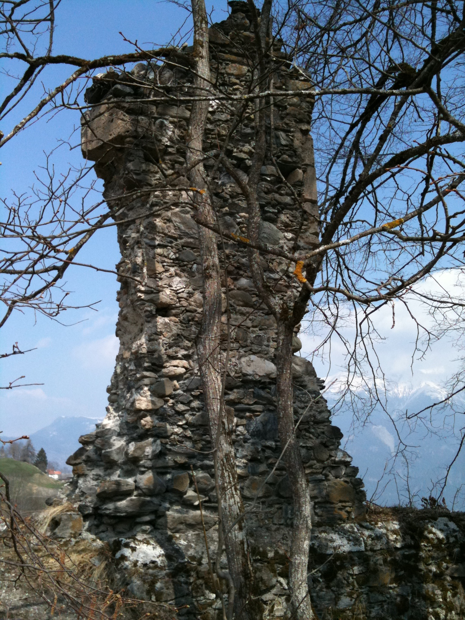 Ruinen der Galluskirche in Portein, Kanton Graubünden